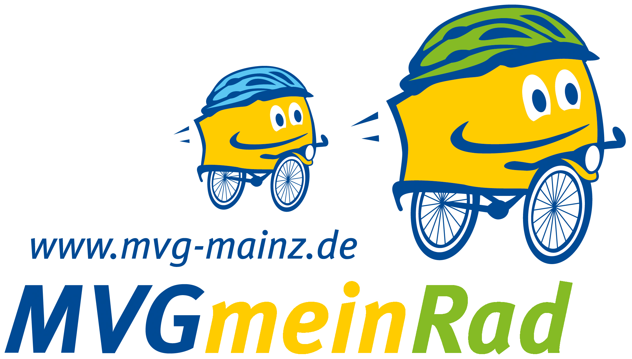 Offizielles Logo seit 1. Januar 2013